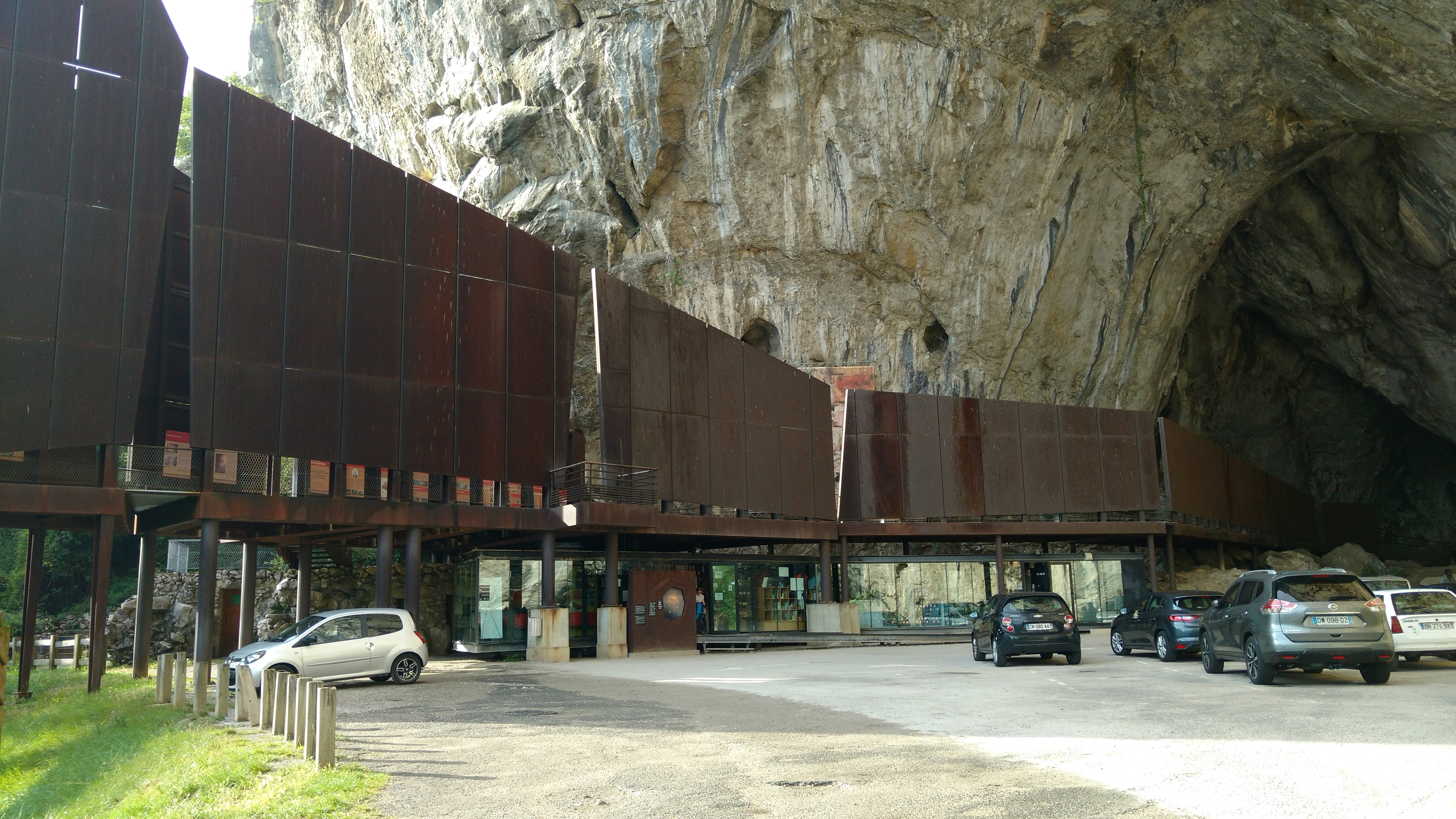 Entrée de la Grotte de Niaux en Ariège en France